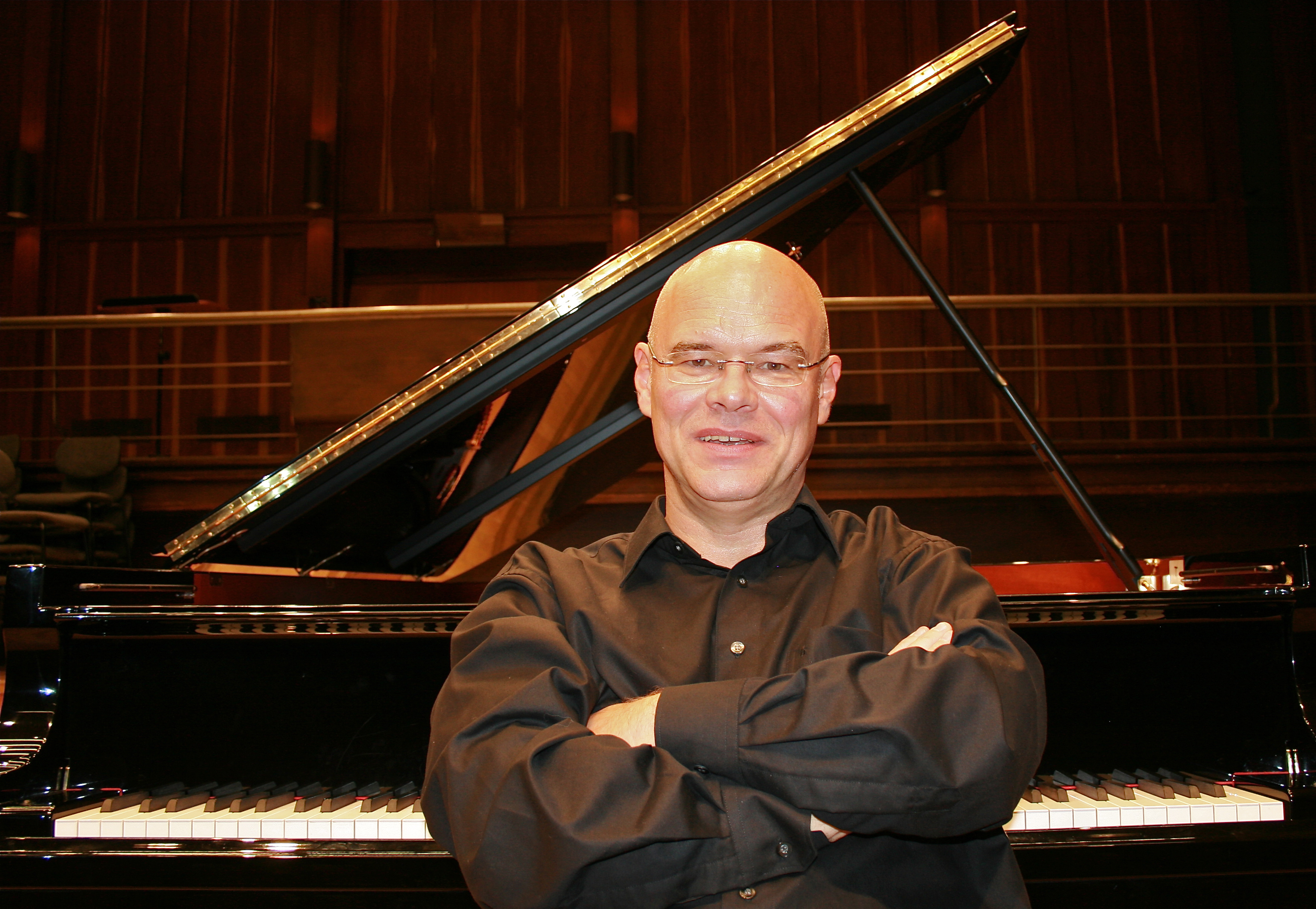 an Flügel